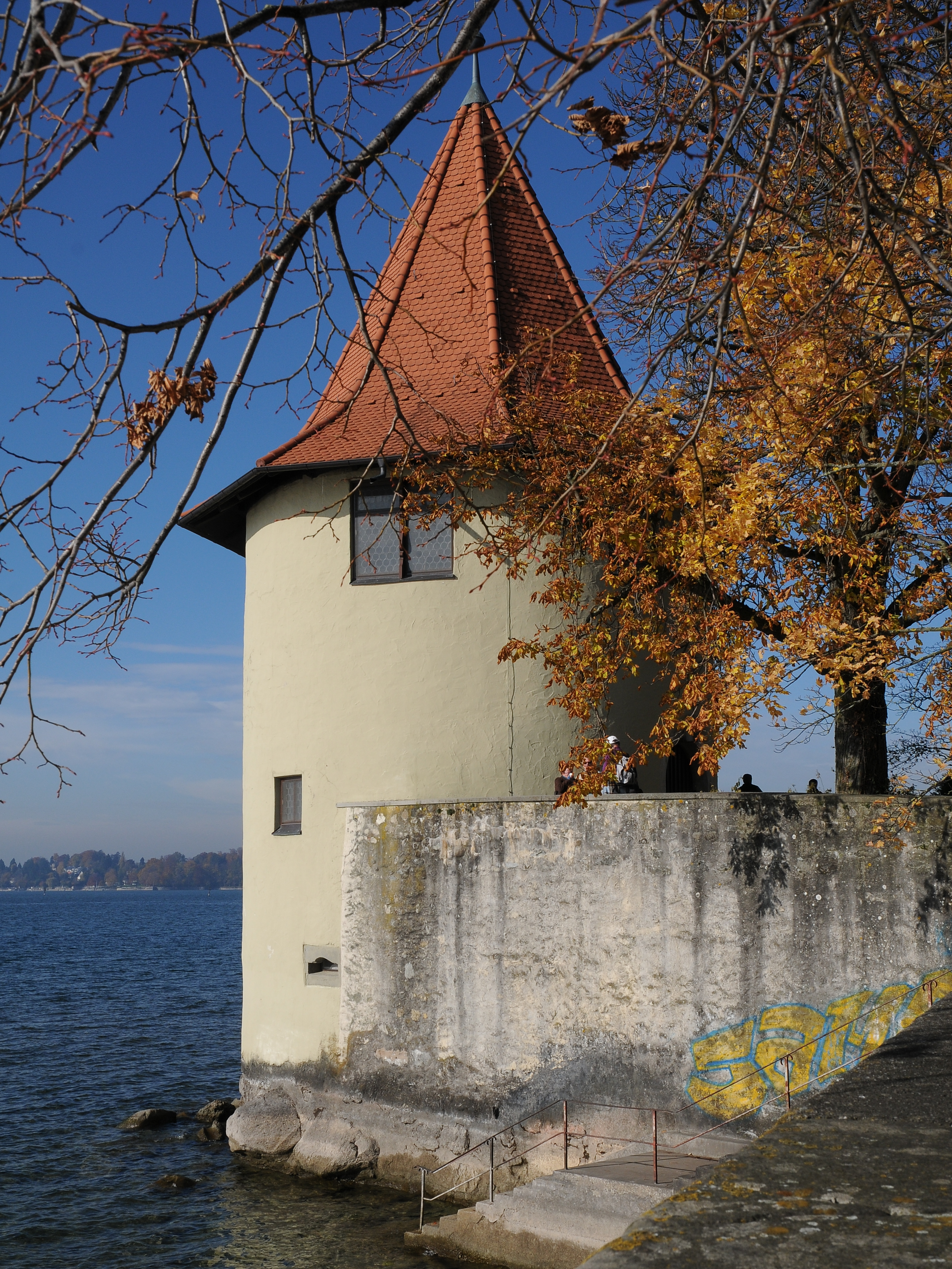 Pulverturm auf der Insel Lindau.